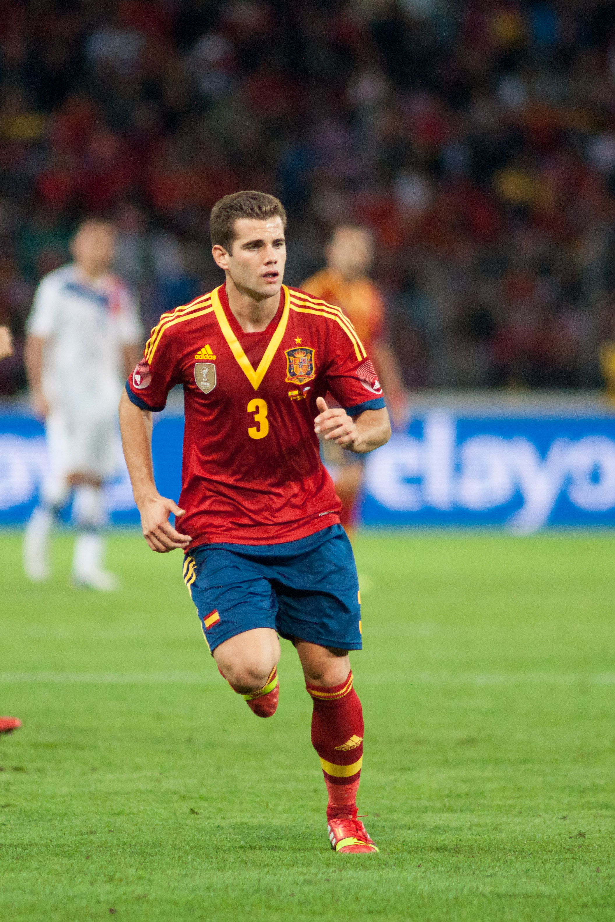 Espagne - Chili, 10 septembre 2013.